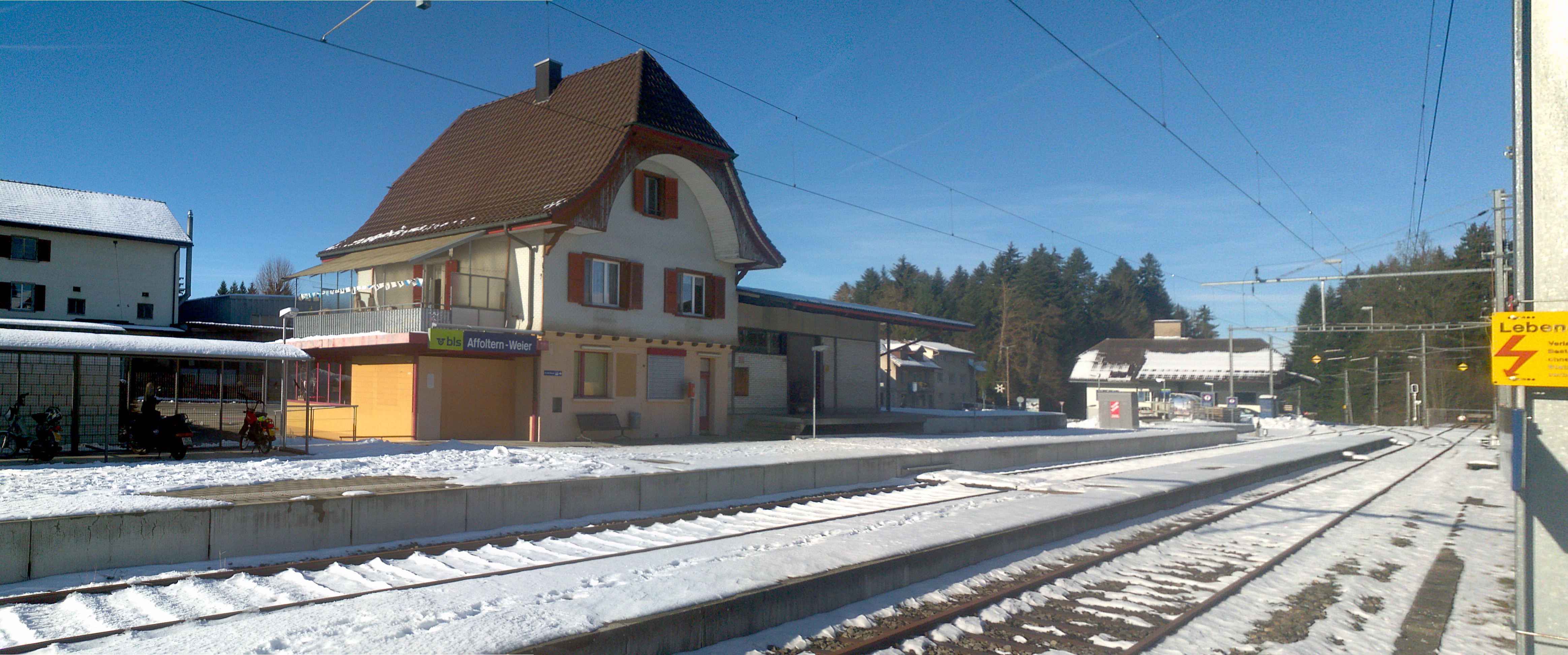 Bahnhof Affoltern-Weier, Kanton Bern